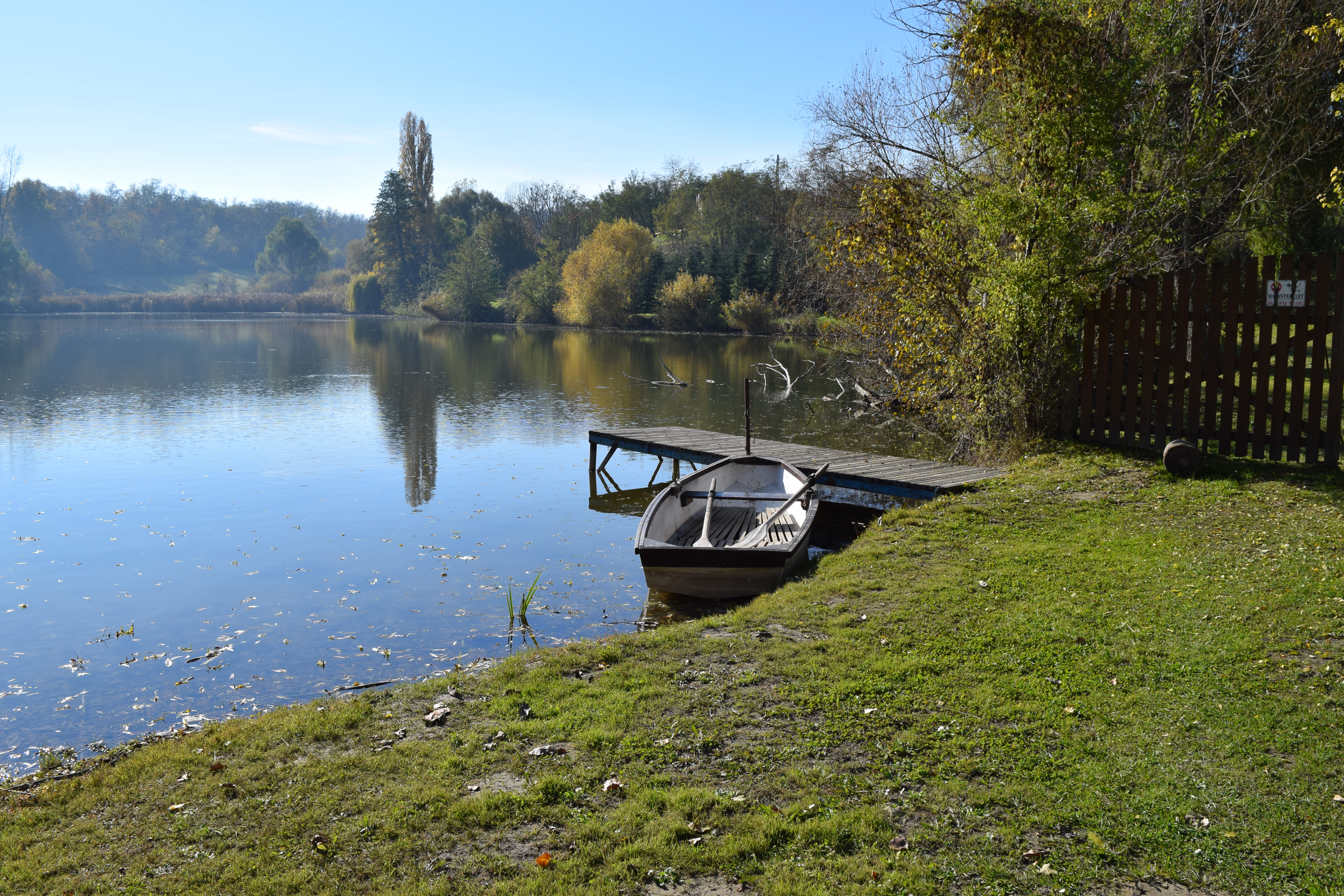 A látrányi horgászparadicsom